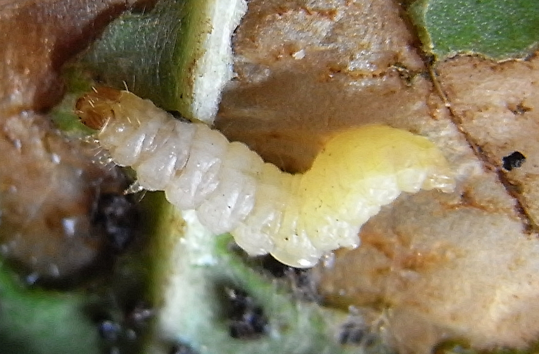 Raupe von Caloptilia cuculipennella in geöffneter Blatttüte aus Ligusterblatt Ricoh R8